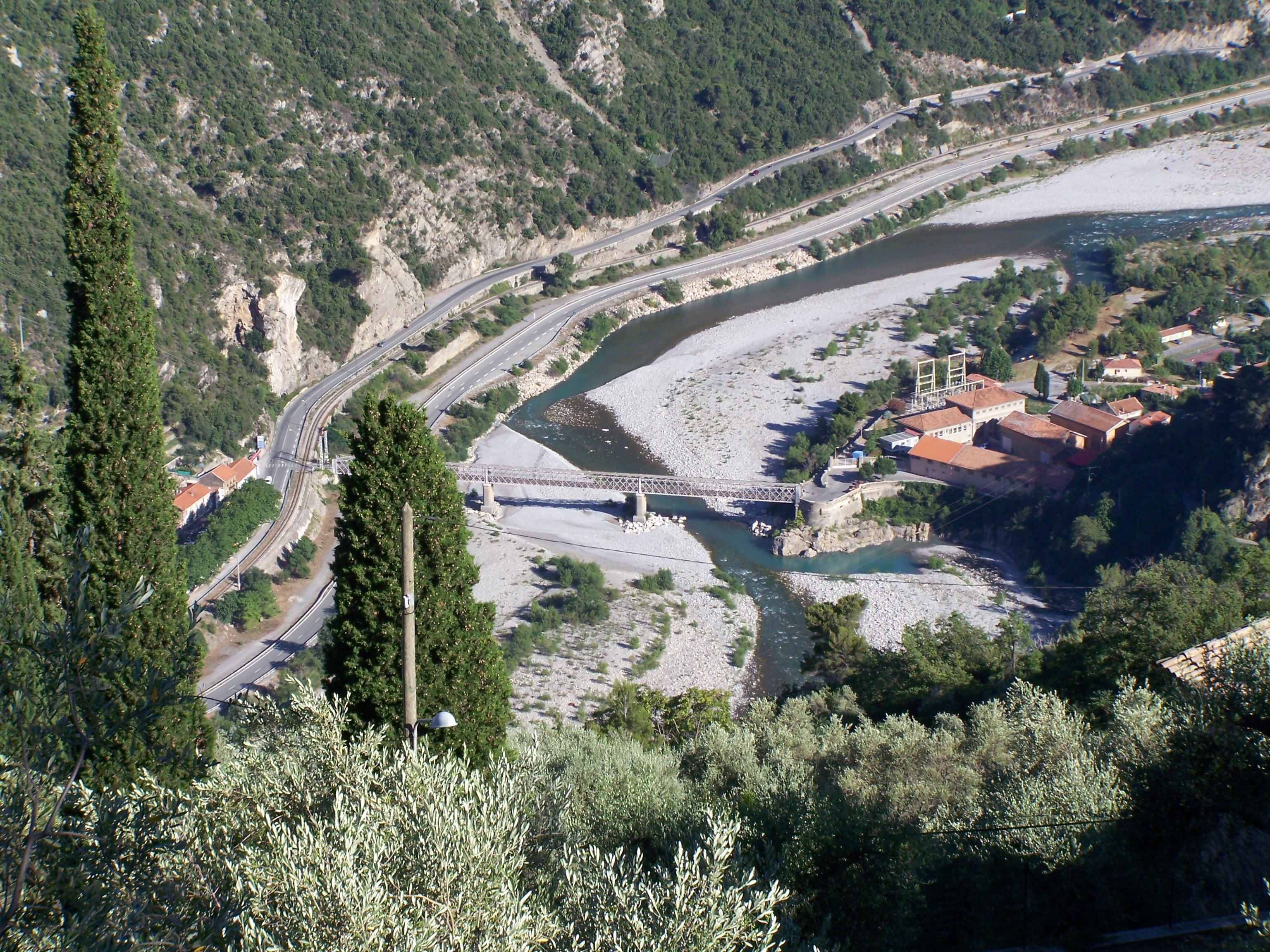 Quartier du Gabre sur la commune de Bonson (Alpes-Maritimes, France), en face de Plan du Var, avec le pont du Gabre et l'usine électrique du Gabre construite en 1890 pour alimenter en électricité les tramways de Nice. Sur l'autre rive du Var, on peut voir la route de Digne (ex-nationale 202, actuellement départementale 6202) et la voie ferrée des Chemins de Fer de Provence ("Train des Pignes").